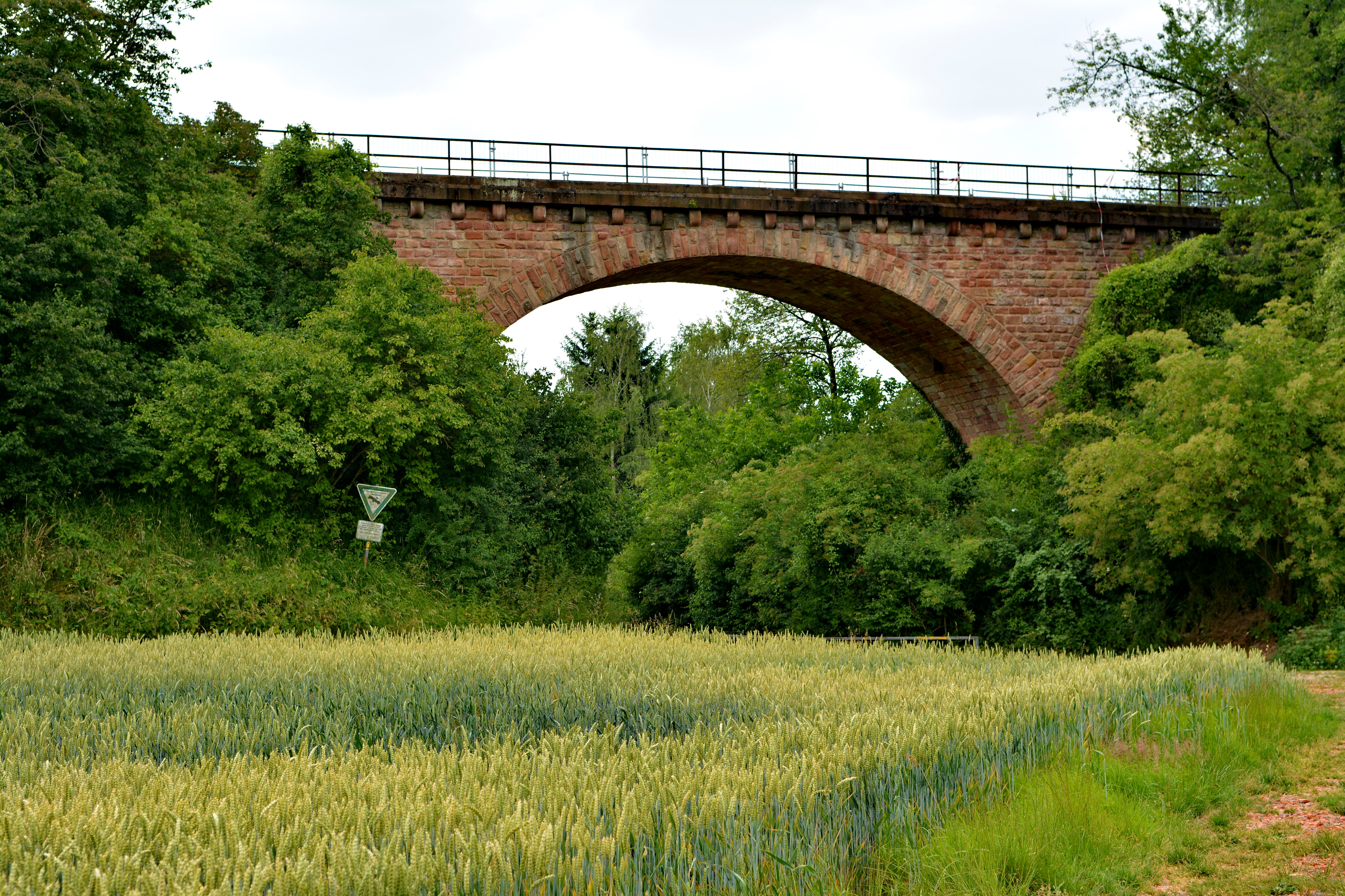 Viadukt der ehem. Bachgaubahn bei Wenigumstadt